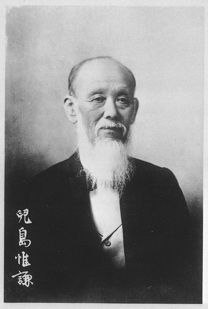 Portrait of Kojima Iken (児島惟謙, 1837 – 1908)